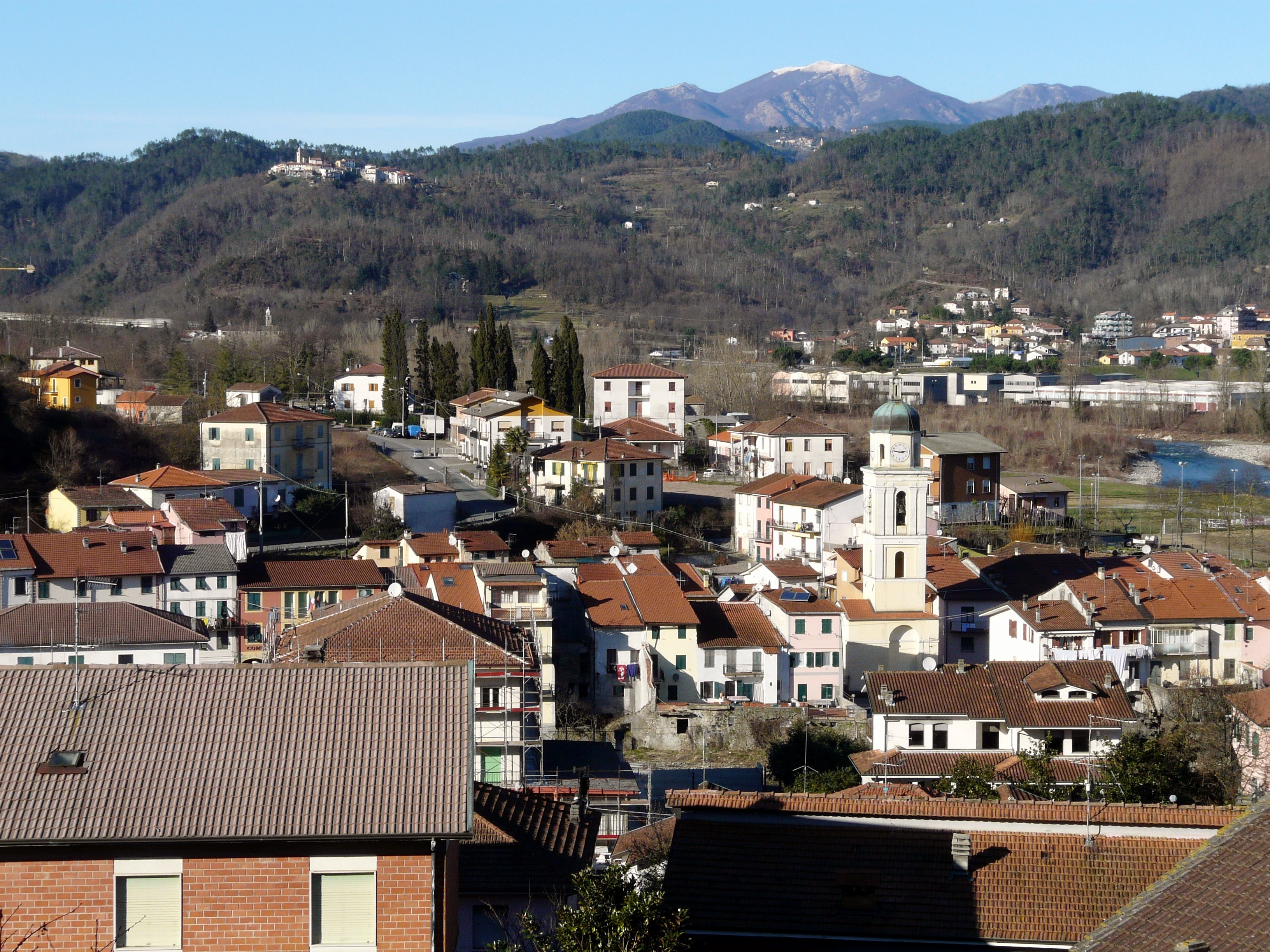 Panorama di Borghetto di Vara, Liguria, Italia